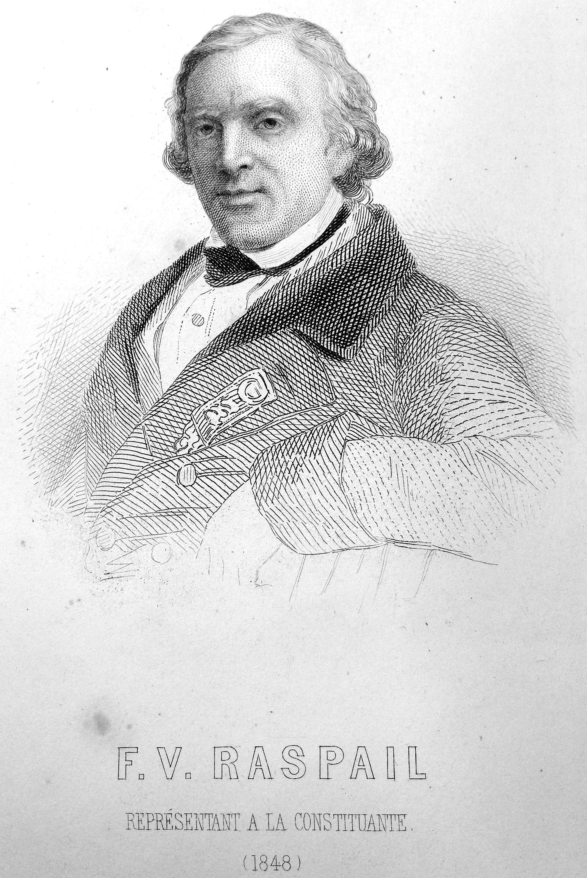 FV Raspail, gravure uit zijn "Manuel annuaire de la santé" uit 1863